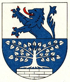 Wappen von Berschweiler bei Baumholder